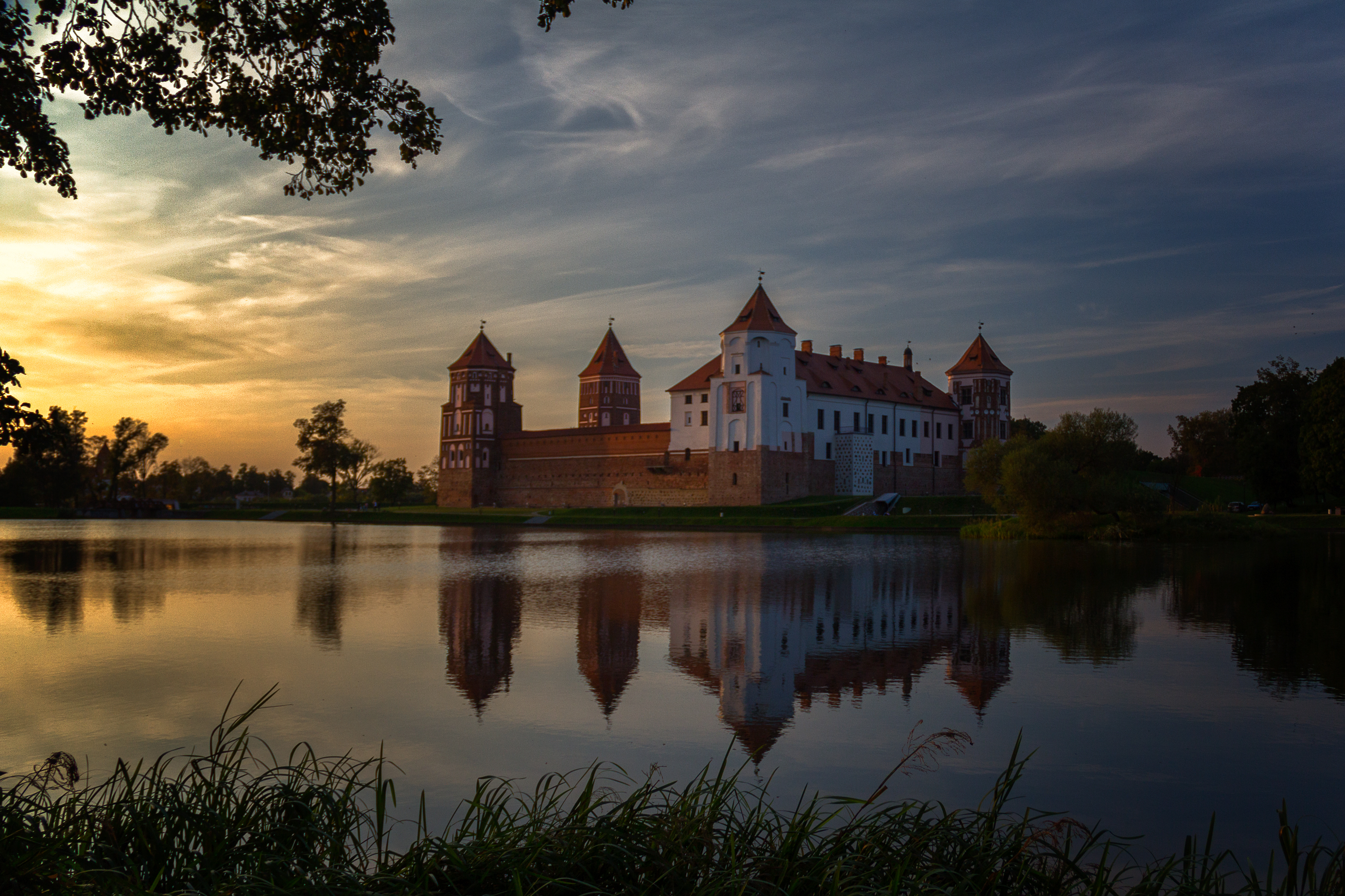 Беларуская (тарашкевіца): Замкавы комплекс «Мір». Будынкі, збудаваньні, пляніровачная структура, ляндшафтныя кампазыцыі, рэшткі земляных абарончых збудаваньняў, элемэнты абвадненьня. г.п. Мір. This is a photo of Belarusian heritage monument. Reference number: 410Г000317 ( WLM)